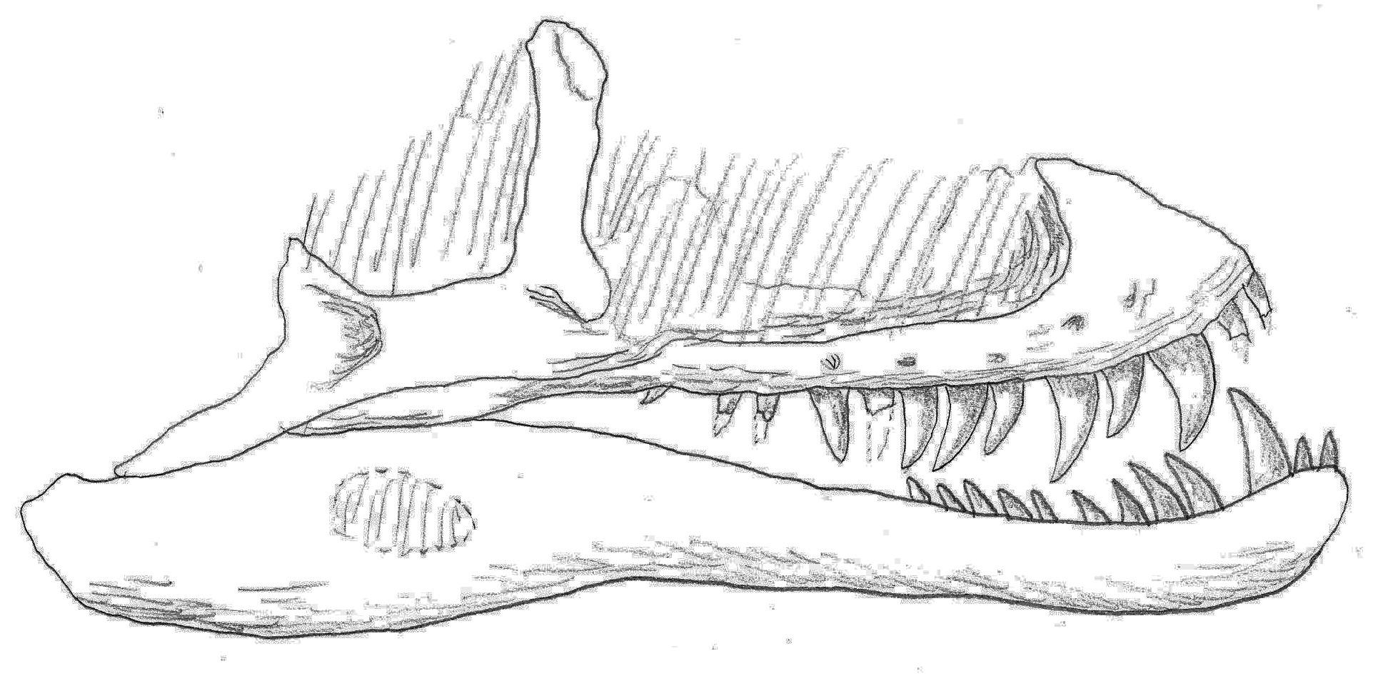 Trialestes romeri skull